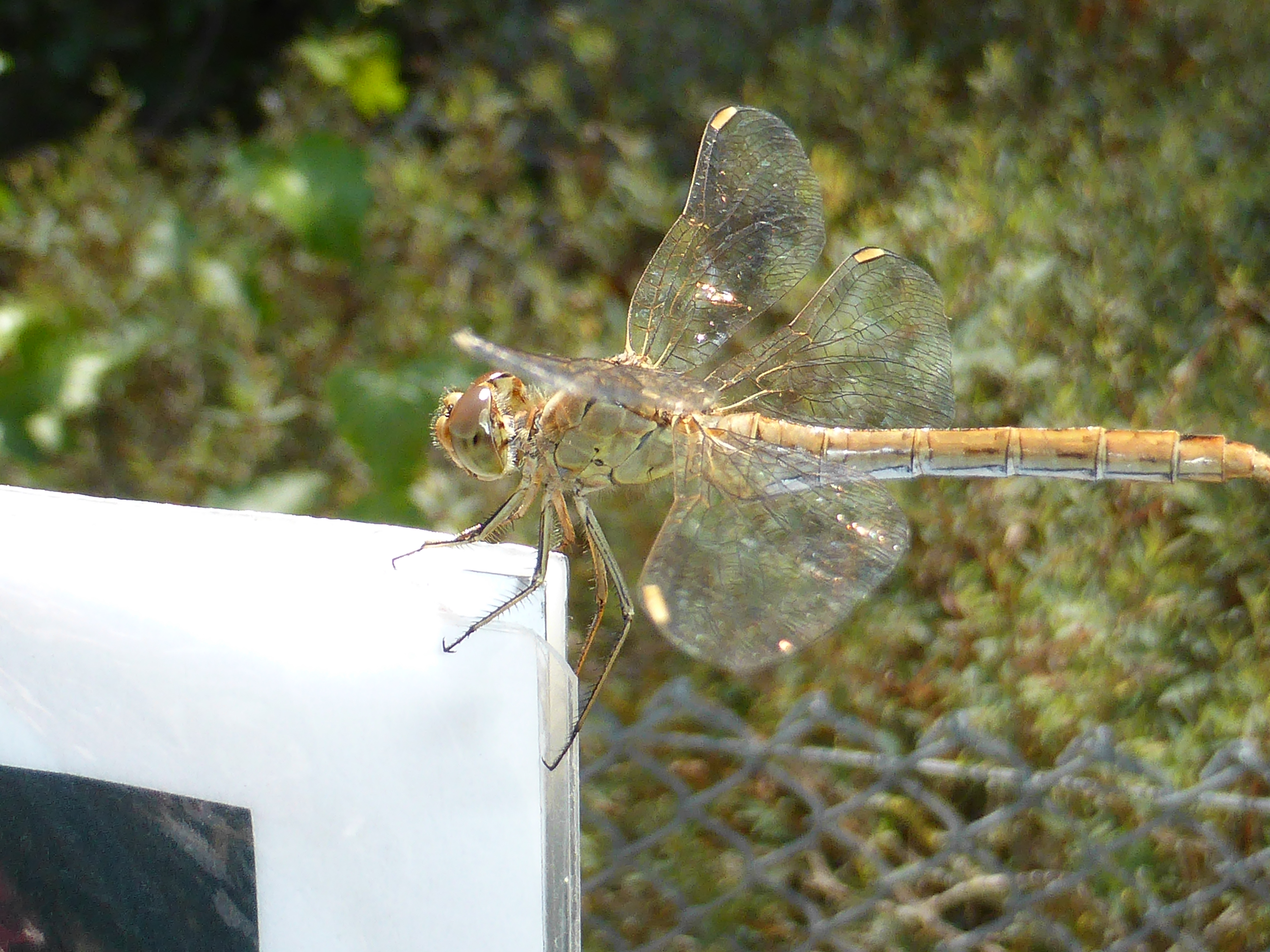 Libellule non identifiée